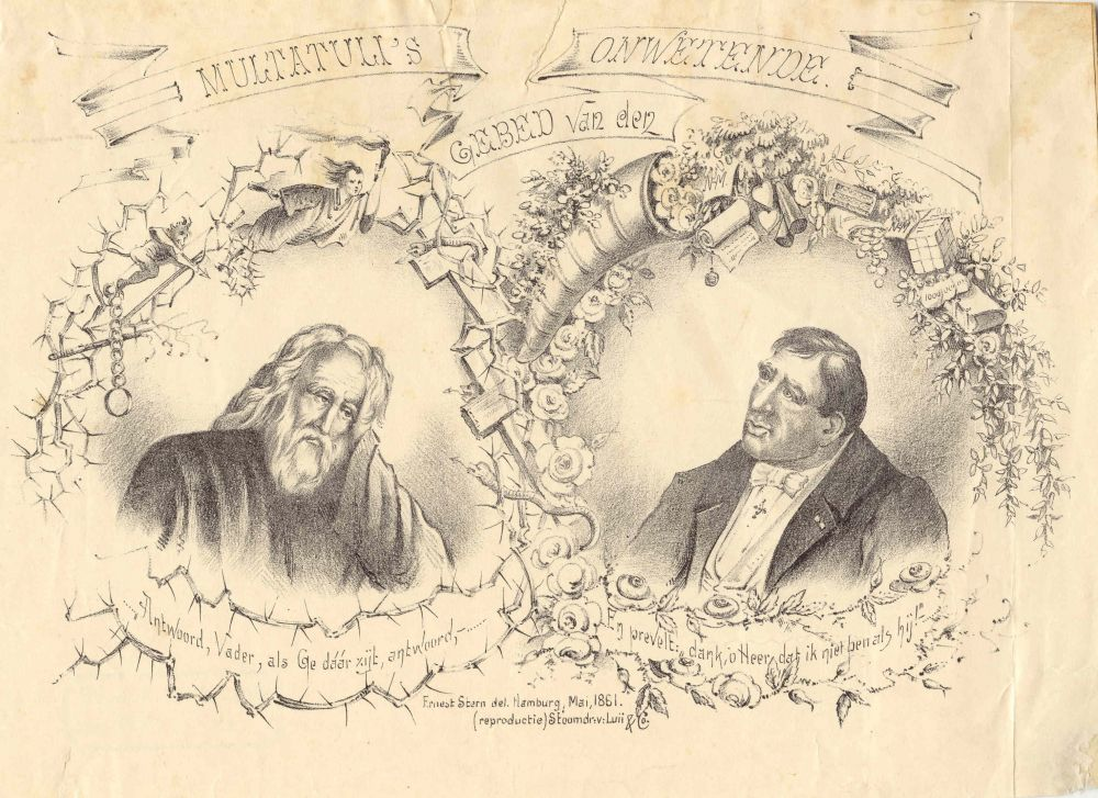 Deze prent is een reproductie van een de prent die werd gepubliceerd bij Het gebed van den onwetende als bijlage in De Dageraad (het tijdschrift van vrijdenkersvereniging De Dageraad), deel XII, blz.80 (maart 1861). De prent met de bebaarde, droevig kijkende figuur, en de omhoog kijkende, net geklede burger. De eerste is een bebaarde, langharige grijsaard, die verzucht: 'Antwoord, Vader, als Ge dáár zijt, antwoord.' De tweede is een welvarende in de kracht van zijn leven: 'En prevelt: dank, o Heer, dat ik niet ben als hij!'